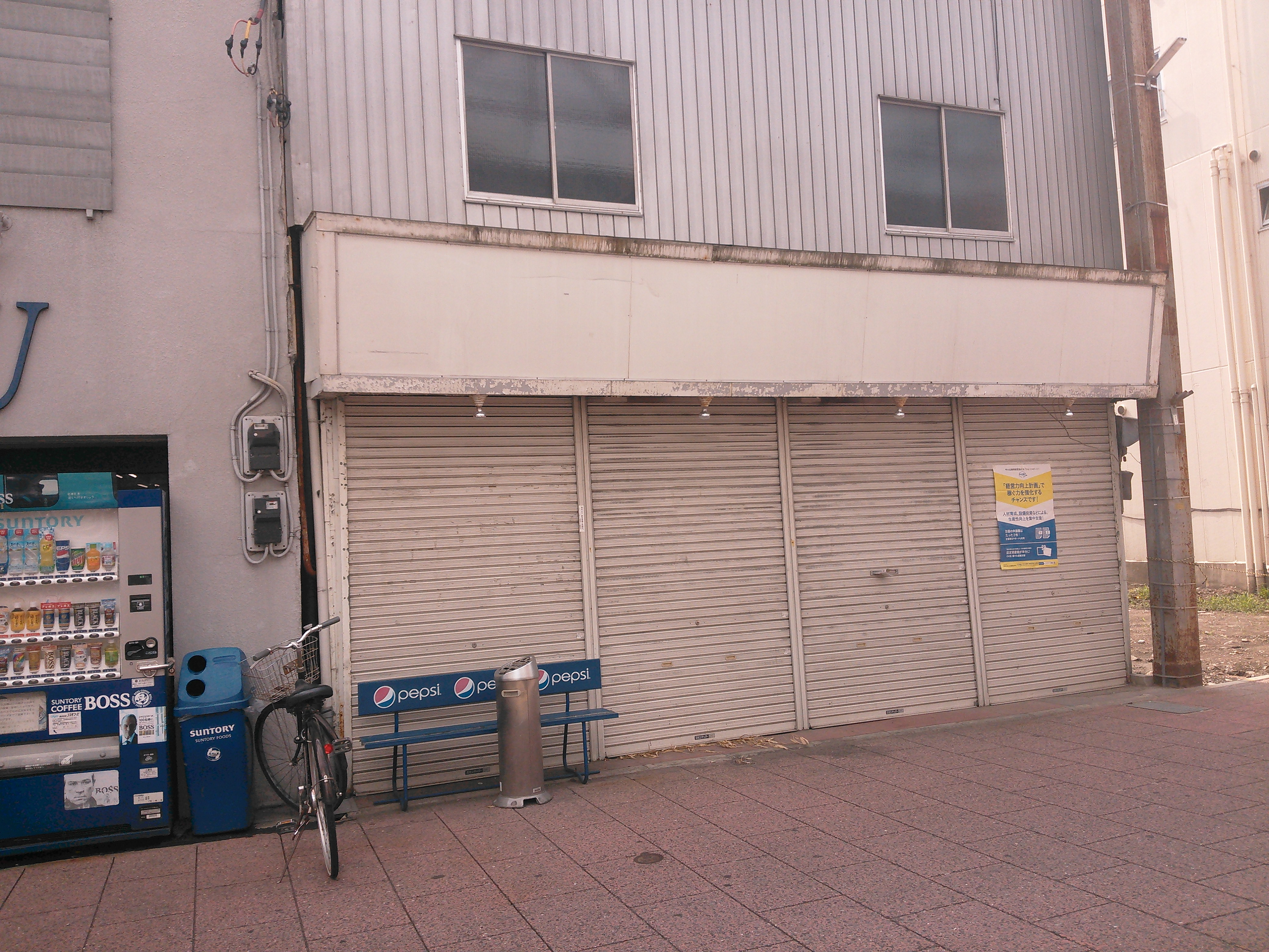 群馬県高崎市、高崎中央銀座商店街。セーラー服と機関銃 -卒業-ロケ地